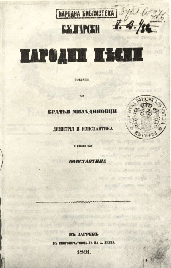 Български „Бѫлгарски народни пѣсни. Собрани отъ братья Миладиновци, Димитрıя и Константина и издадени отъ Константина. Въ Загребъ. Въ книгопечатница-та на А. Якича, 1861“ English Front page of „"Bulgarian Folk Songs collected by the Miladinov Brothers Dimitar and Konstantin and published by Konstantin in Zagreb at the printing house of A. Jakic, 1861"“ by the Miladinov Brothers Македонски Браќа Миладиновци, „Български народни песни“